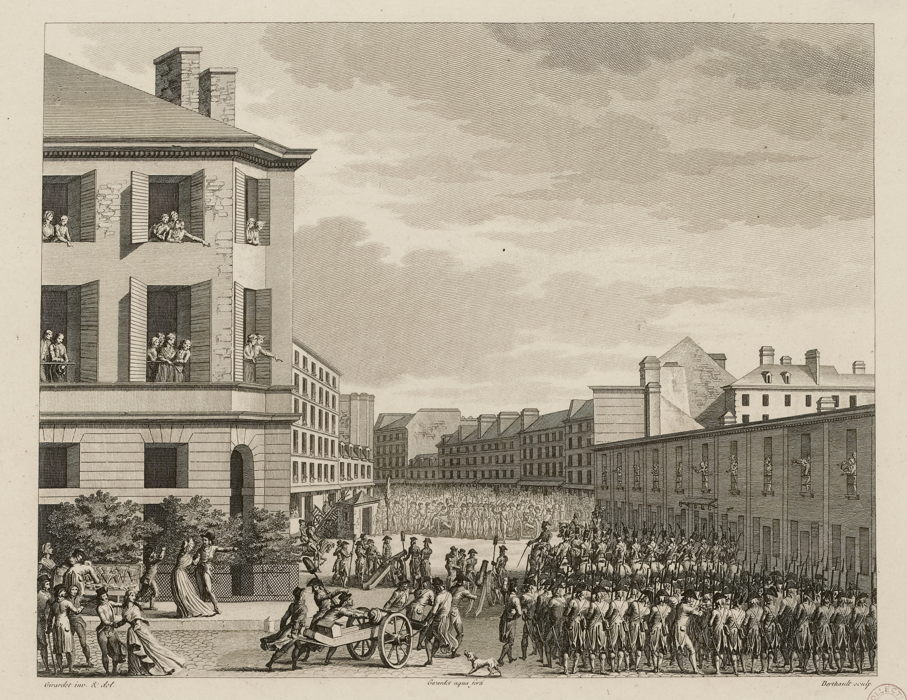 Attaque du Faubourg St Antoine / le 4 Prairial An 3eme de la République. Girardet, Abraham